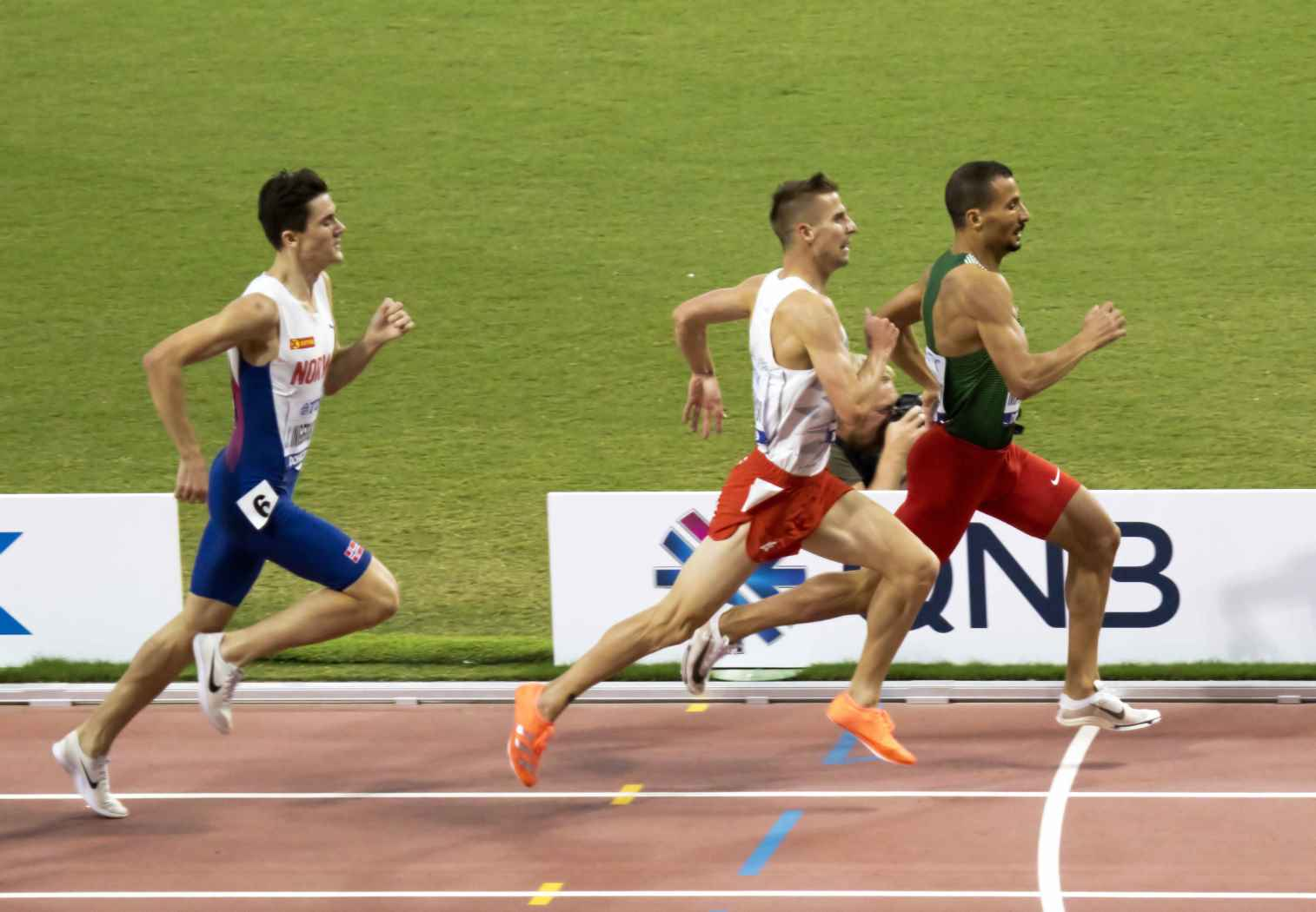 DOH90061 1500m men final lewandowski ingebrigtsen